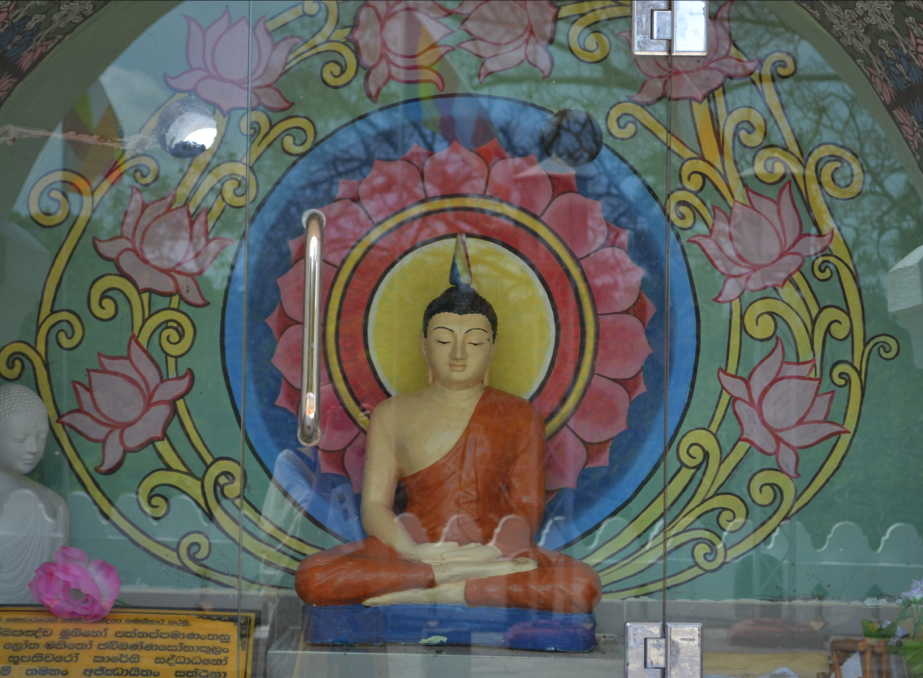 Estatua de Buda meditando en Anuradhapura, Sri Lanka